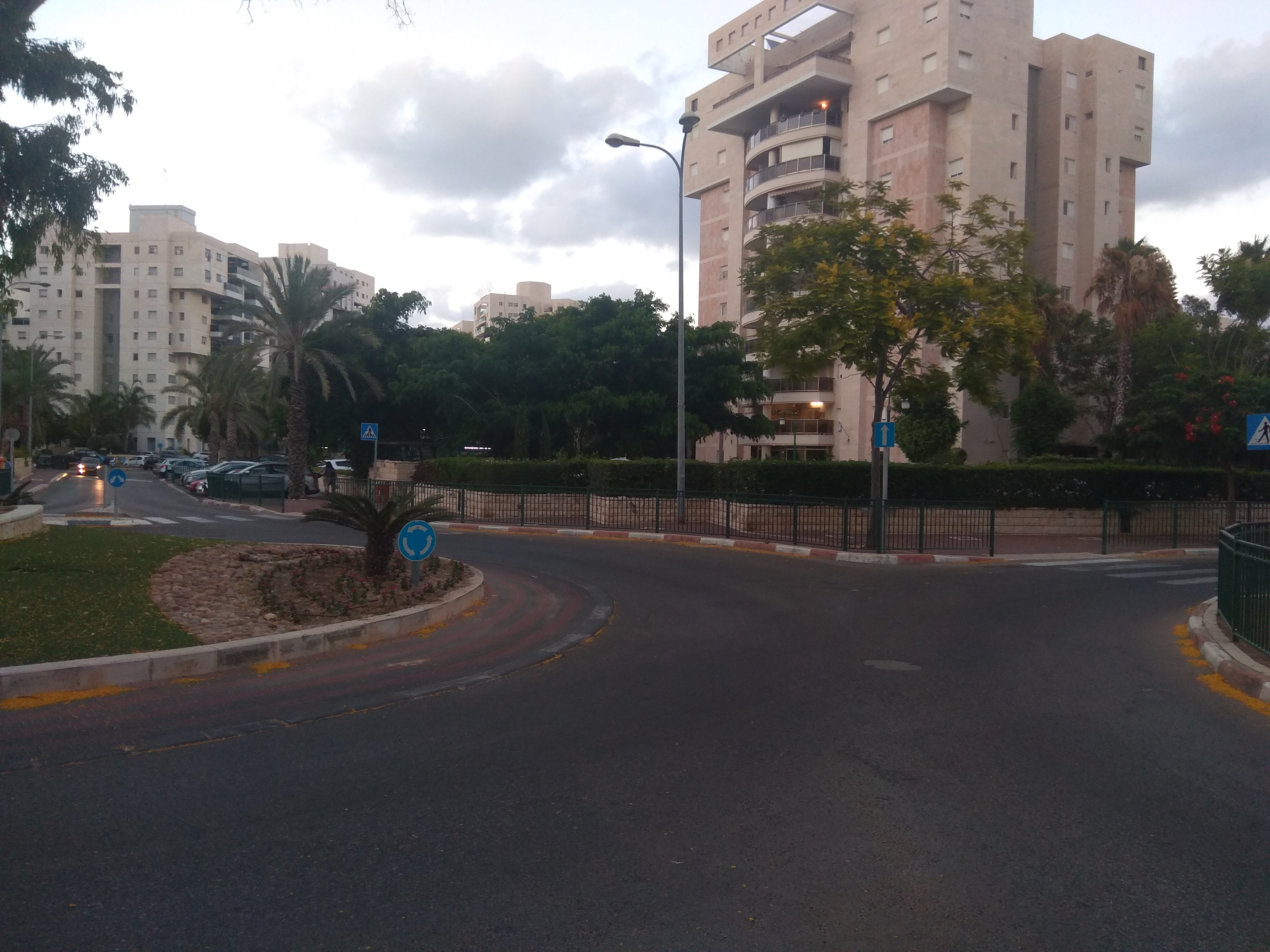 נווה גנים קריית מוצקין